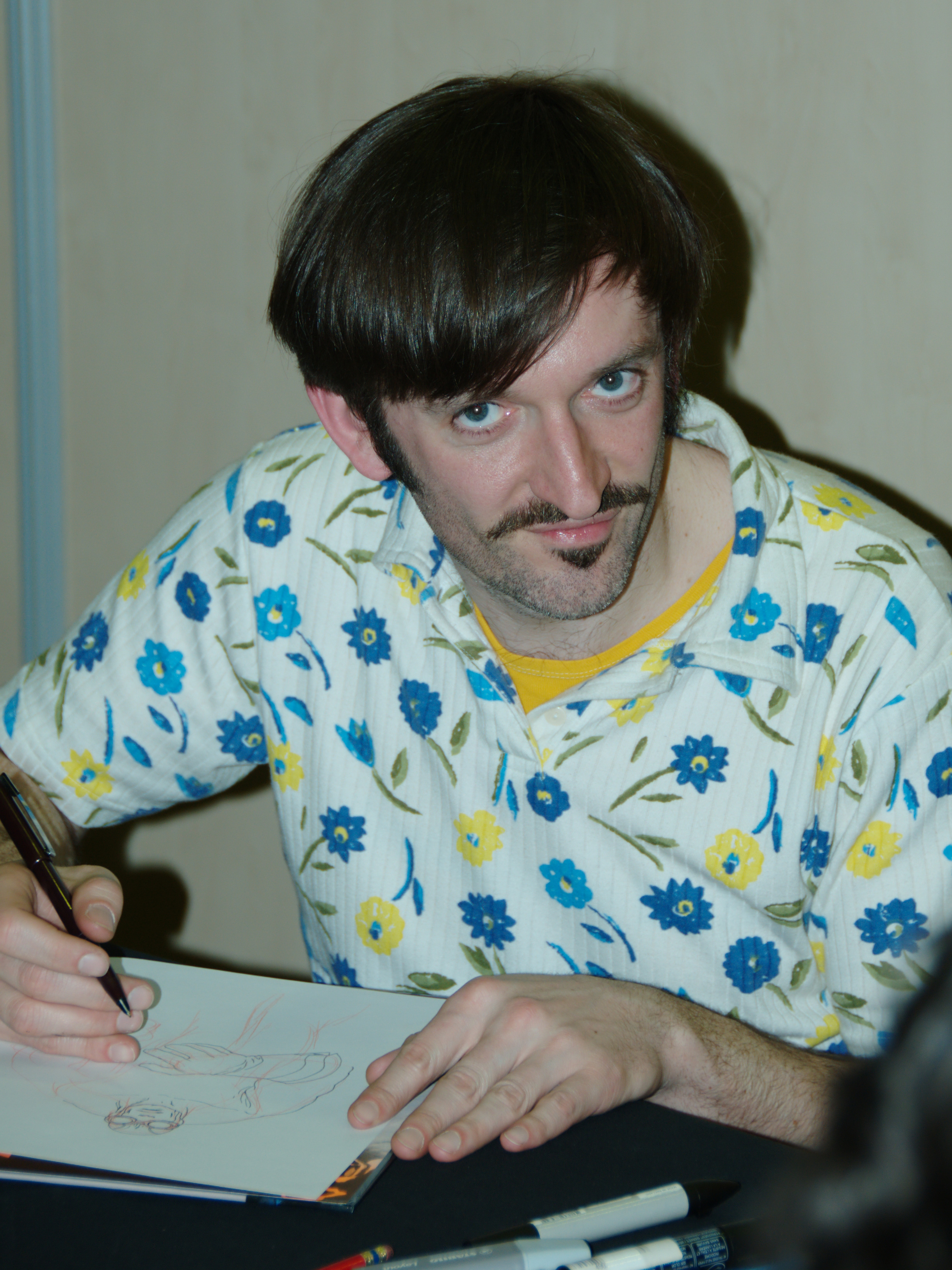 Vince au festival de Bande dessinée de Mandelieu